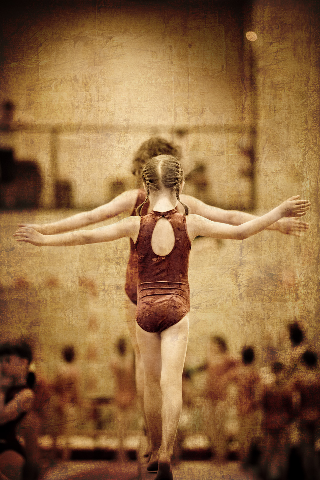 Petites gymnastes sur un poutre, lors d'un Concours Poussins.